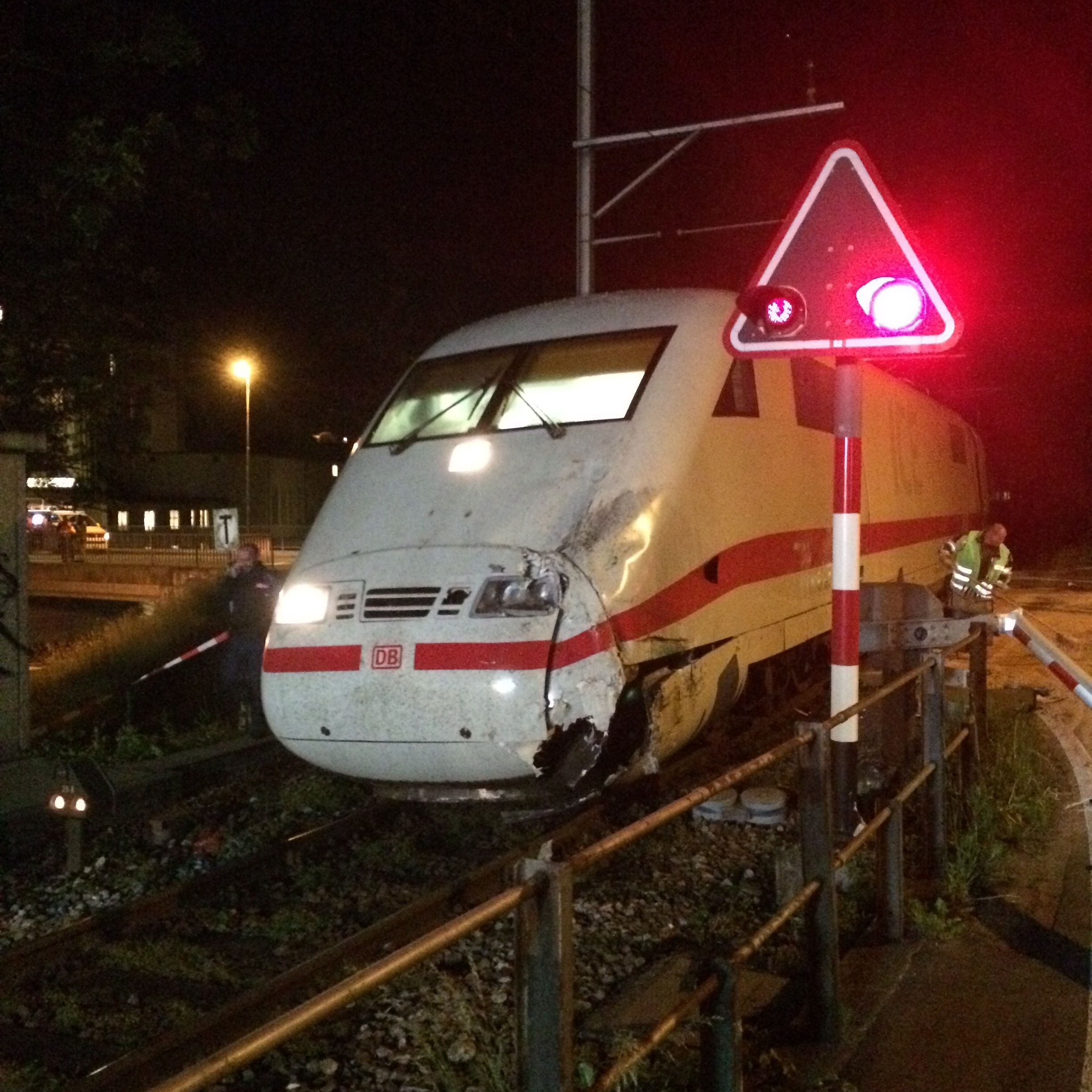 Am Freitag, 20. Mai 2016 kollidierte in Interlaken auf einem Bahnübergang der BLS ein ICE der DB AG mit einem Reisecar. 17 Personen mussten in Spitalpflege verbracht werden. Im Zug wurde niemand verletzt.